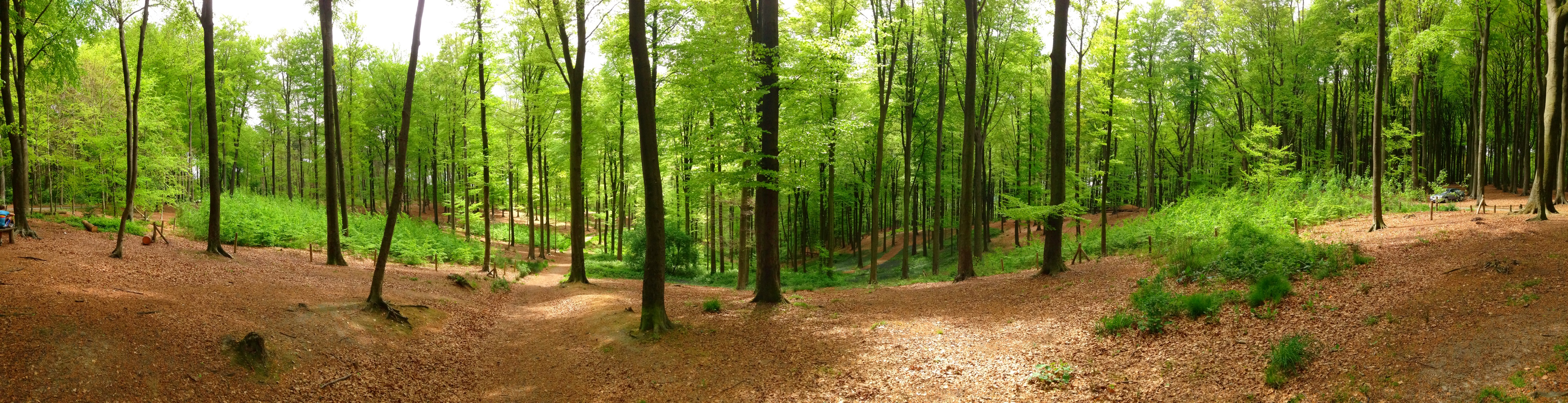 panoramisch zicht op muziekbos met boshyacinthen